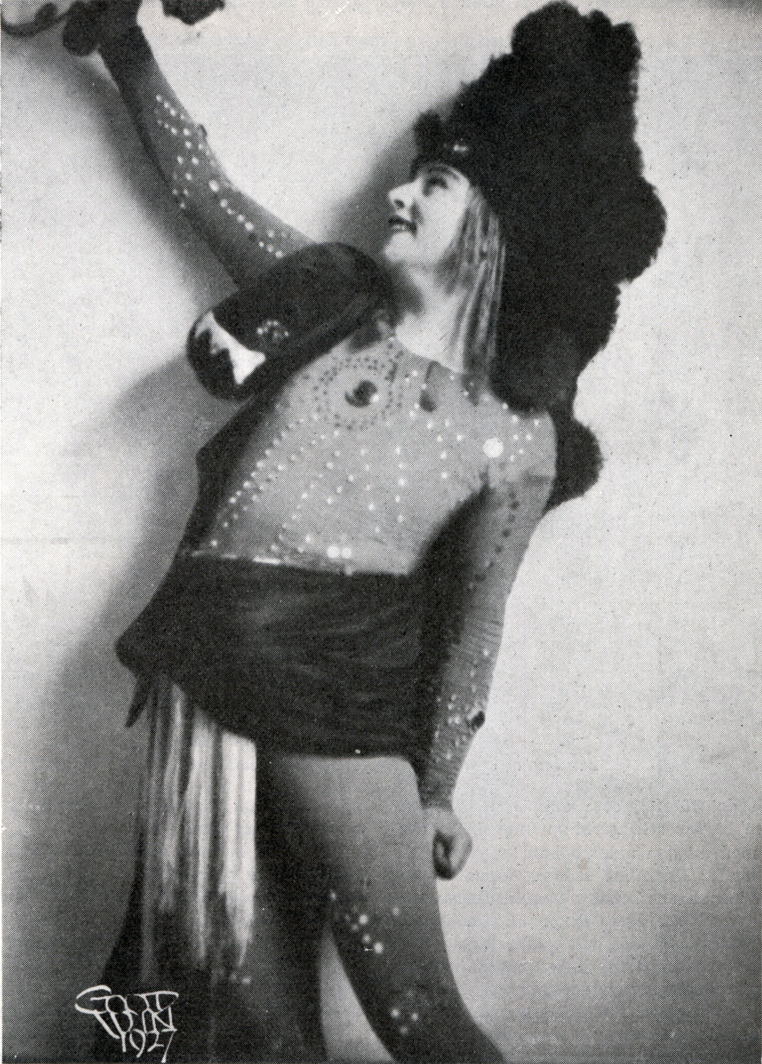 Signe Kolthoff (1881-1961) som Oberon i En midsommarnattsdröm på Dramaten. Rollfoto i Scenen 1927.